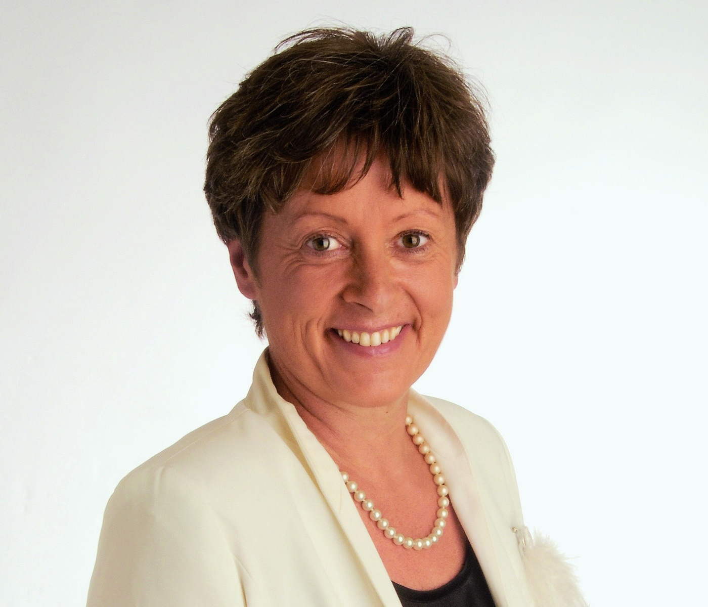 Margret Kiener Nellen ist eine Schweizer Politikerin der Sozialdemokratischen Partei.